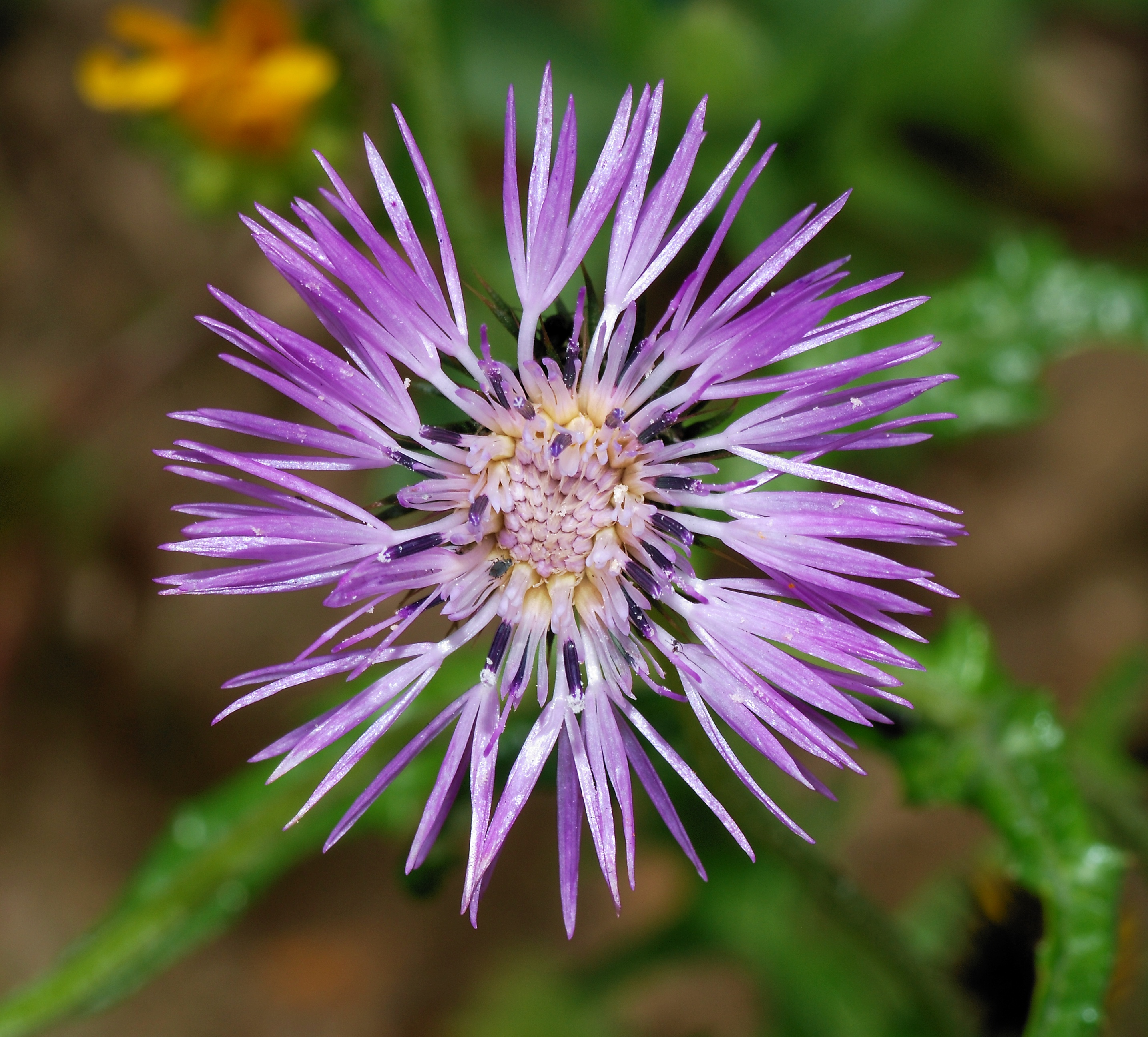 Galactites (Galactites tomentosa)